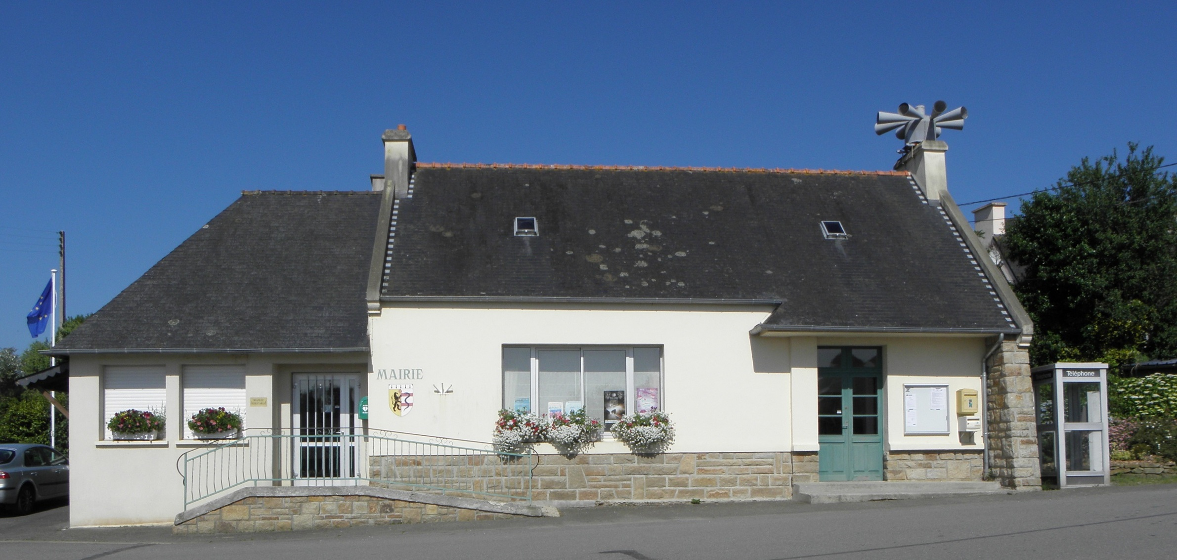 Mairie de Loc-Brévalaire (29).